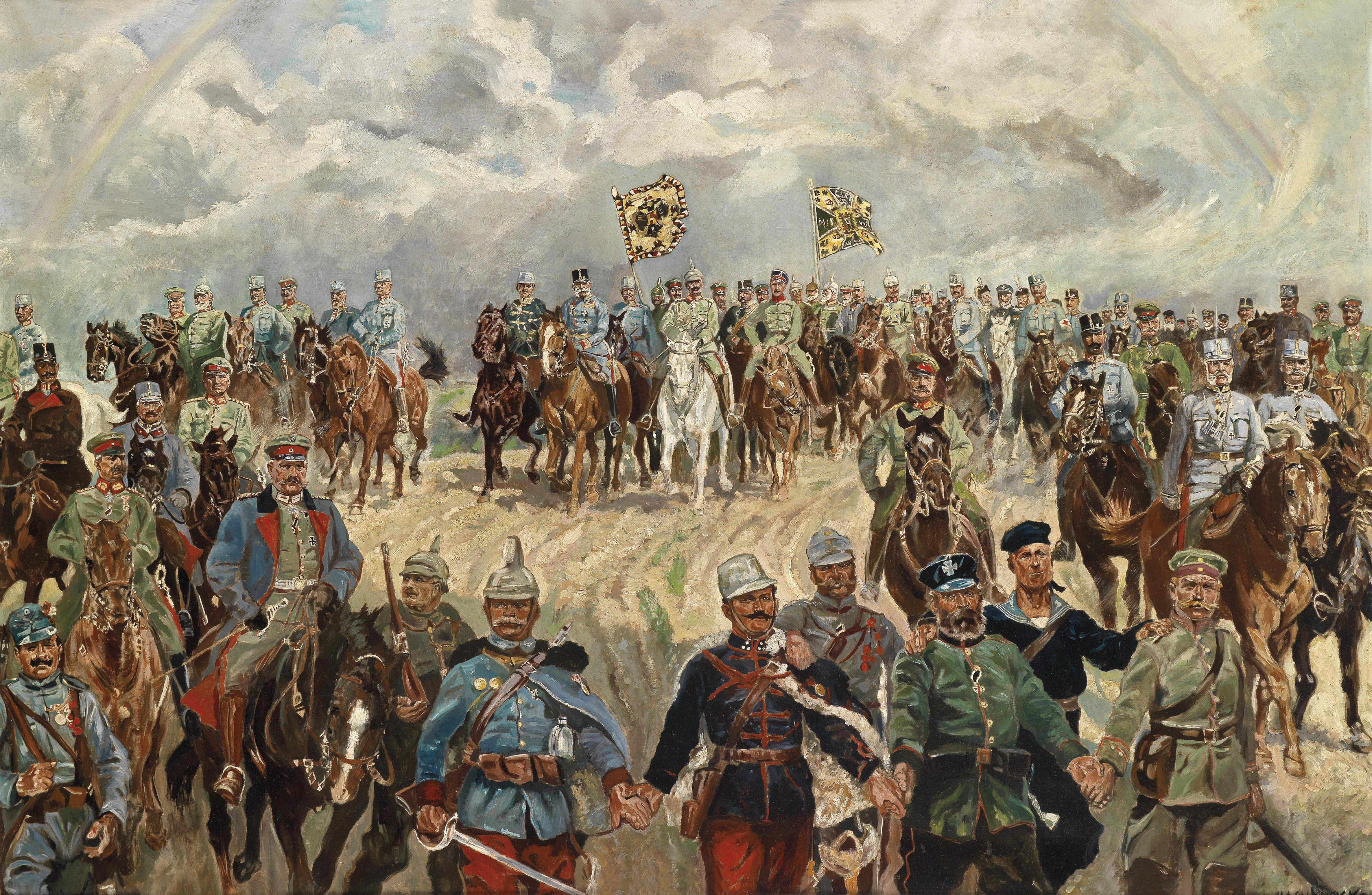 Franz Joseph, Wilhelm II. und andere deutsche Regenten, deutsche und österreichische Generale und – symbolisch - einzelne Truppenteile